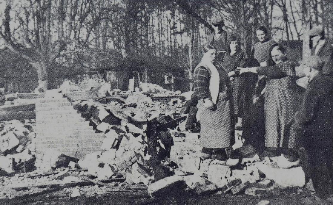 Cafe Tante Sien te Vasse na de brand in 1935. Tante Sien is de vrouw die wijst, links staat haar zus.